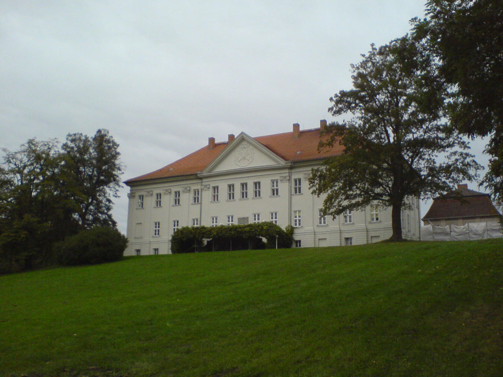 Schloss Hohenzieritz, Gartenseite